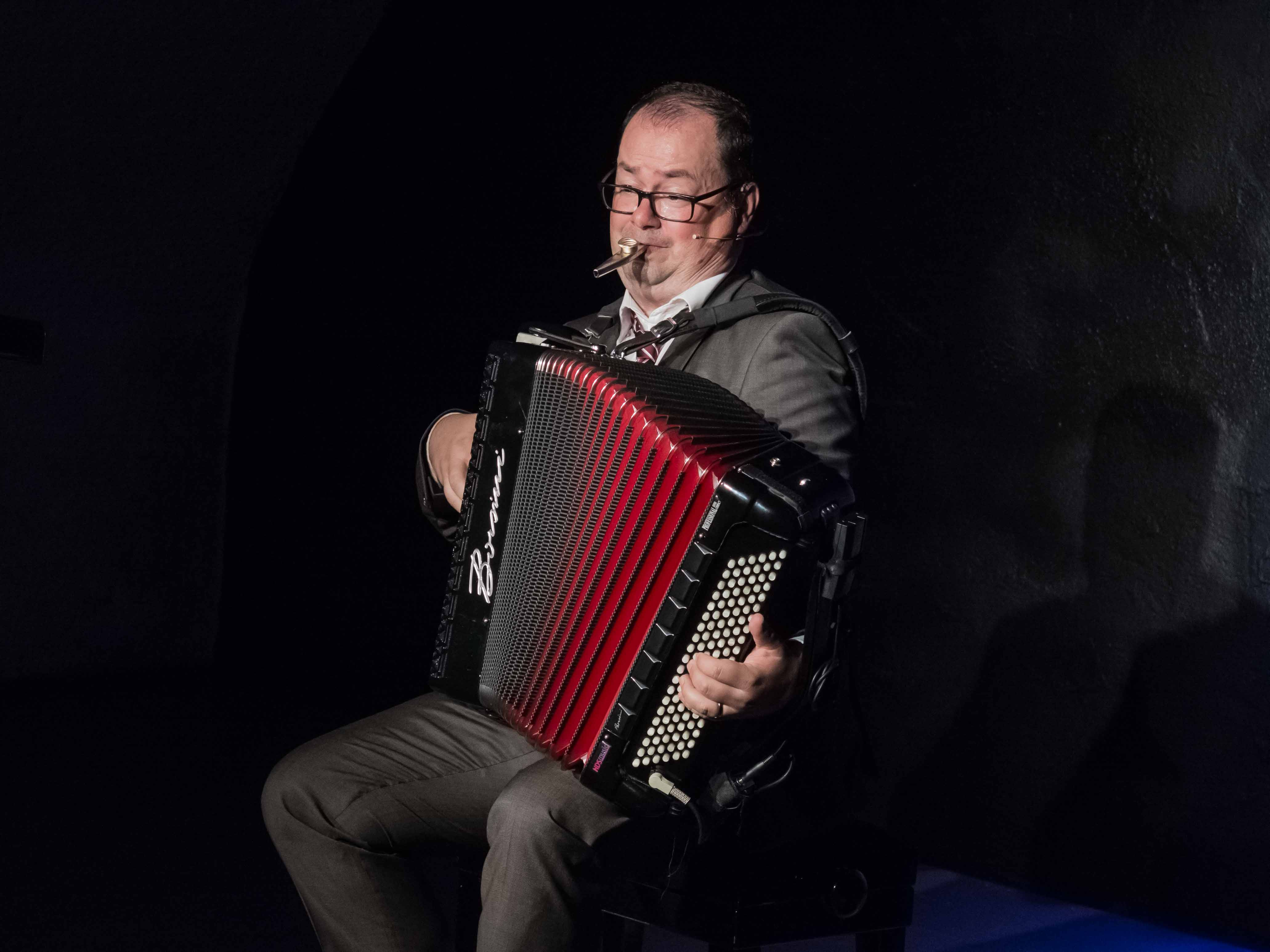 Im Alter von vier Jahren das erste Mal ein Akkordeon in der Hand ließ Grischek es jedoch für ein paar Jahre wieder los um klassischer Trompeter zu werden. 1990 gründete Grischek die Hamburger Kultfolkband„The Roving Bottles“ und hatte seine 120-Bass-Quetschkommode, zwei Trompeten, eine Tuba, sein Klavier, eine Querflöte und mehrere irische Flöten, sogenannte „Tinwhistles“ im Gepäck, brachte mit dieser Gruppe große Konzertsäle zum kochen und insgesamt drei CDs heraus. 1996 gewann er mit der Kabarettistin Käthe Lachmann den NDR Comedy Preis. Zusammen gingen die beiden im folgenden Jahr mit Götz Alsmann, Atze Schröder und dem blonden Emil auf Tournee.Es folgten 8 Jahre regelmäßige Tourneen und Auftritte mit Käthe Lachmann. Intensive Zusammenarbeit folgte ab 2002 dann mit Henning Venske, mit dem Grischek bis heute regelmäßig Auftritte bestreitet. Im Herbst 2007 kam Jochen Busse für die folgenden 4 Jahre hinzu. In dieser Zeit entstanden 2 gemeinsame Programme mit über 350 Vorstellungen. Seit Frühjahr 2012 nun das erste Soloprogramm von Frank Grischek mit dem Titel „unerhört“. frankgrischek.de